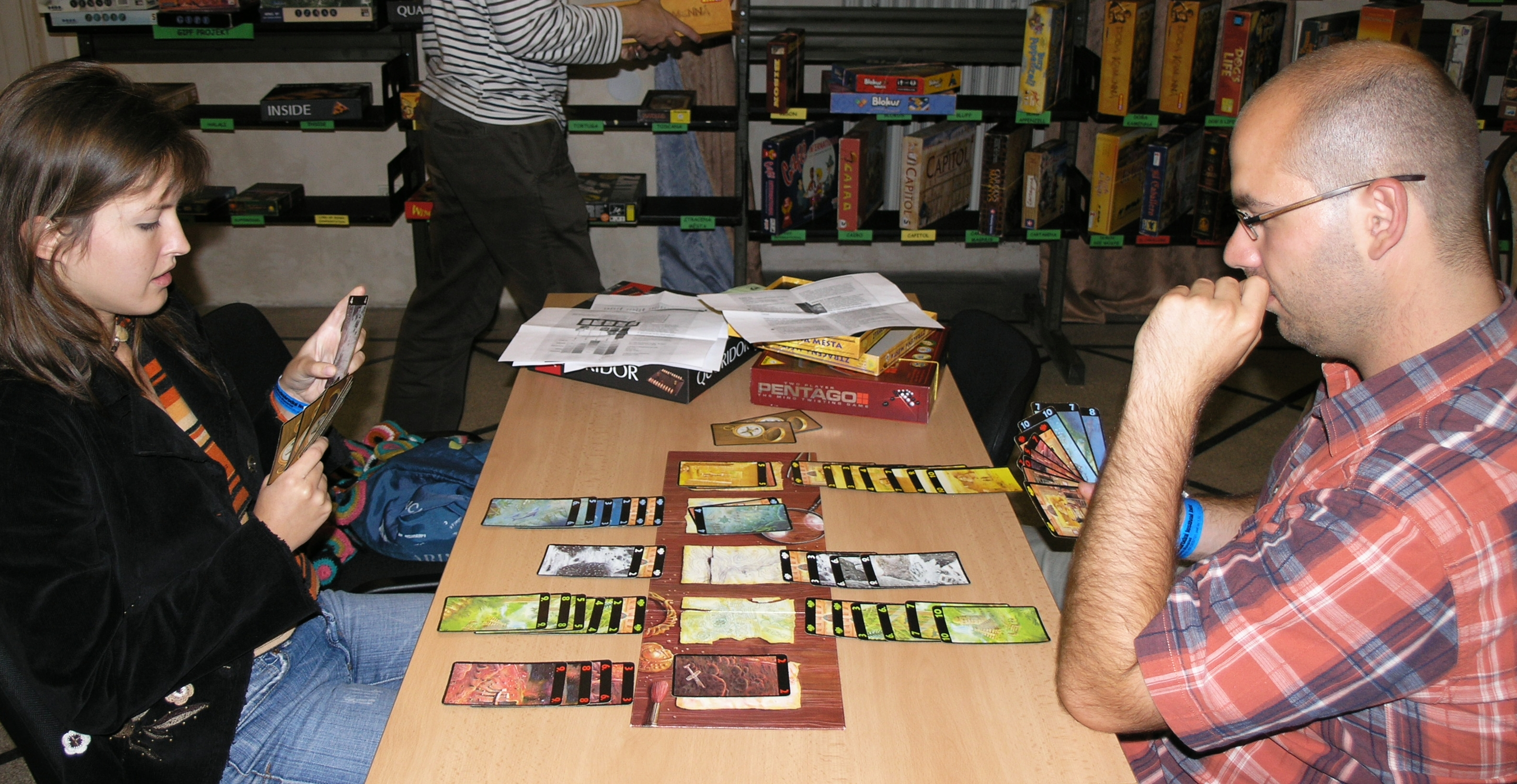 Deskohraní 2008